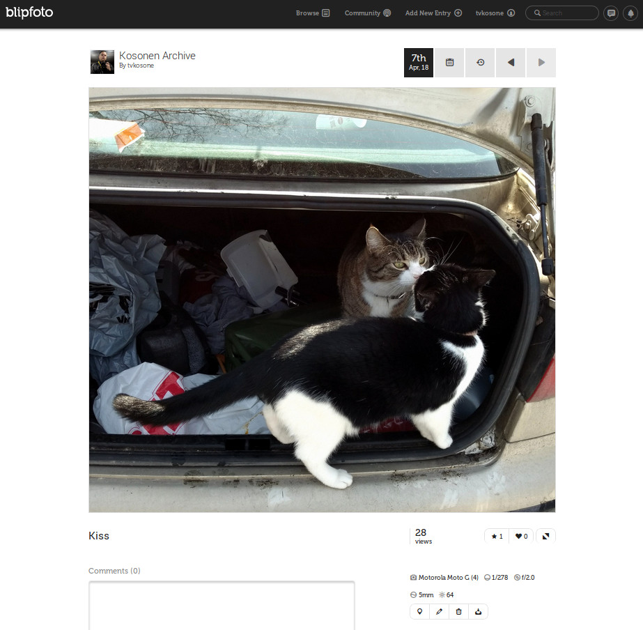 Kuvaruutukaappaus Blipfotosta 7.4.2018